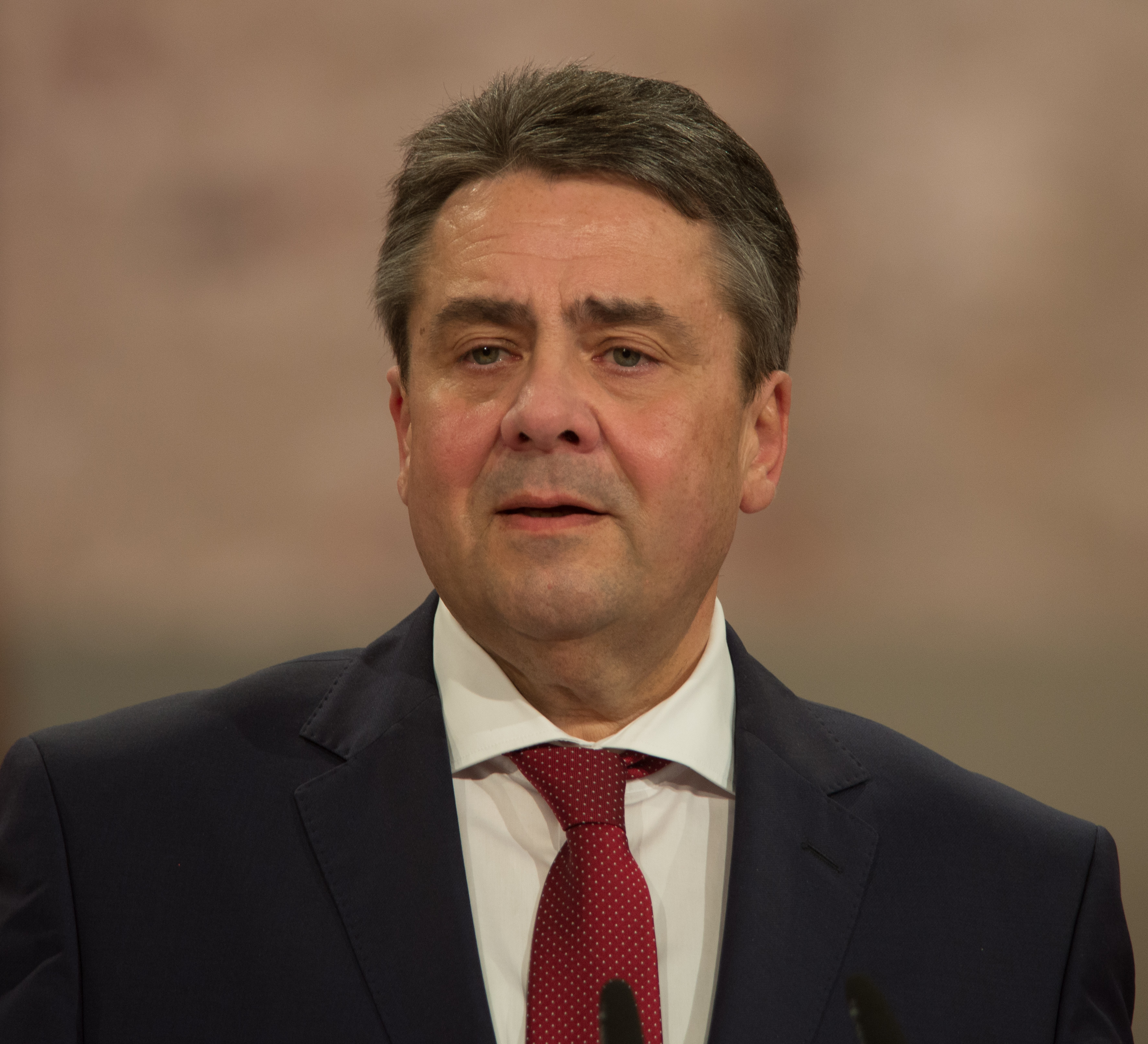 Sigmar Gabriel, SPD, auf dem SPD Bundesparteitag am 19. März 2017 in Berlin